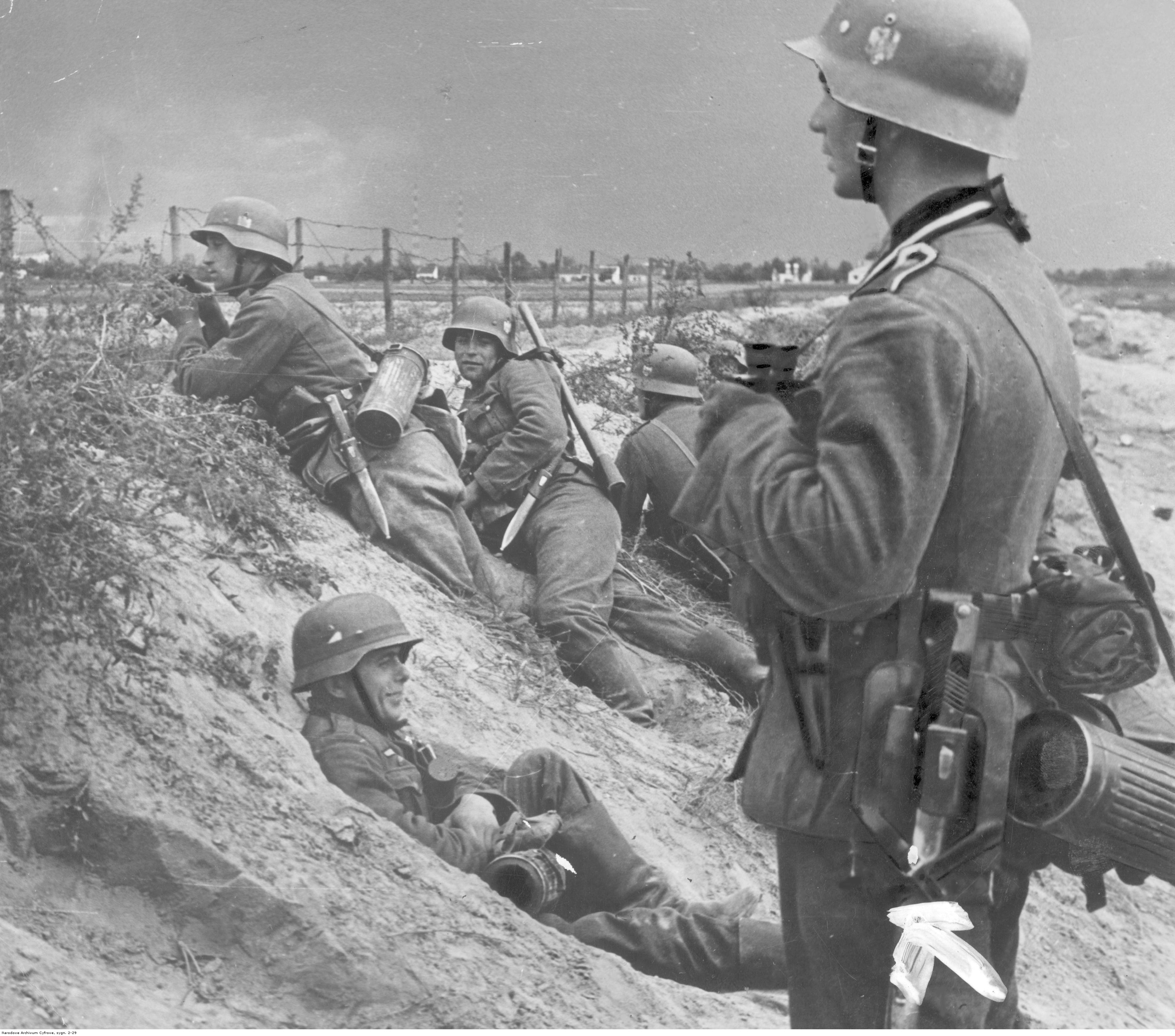 Żołnierze niemieccy w okopach podczas walk o Warszawę.